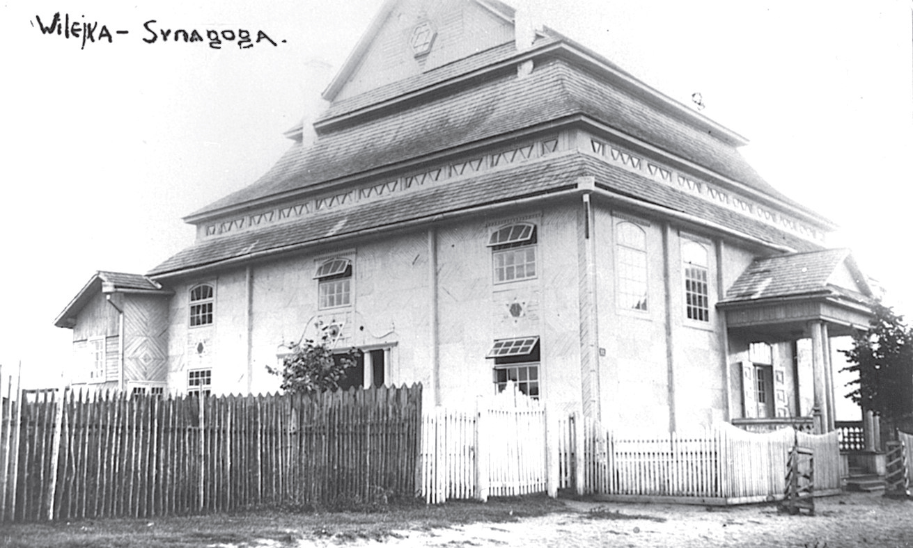 Беларуская (тарашкевіца): Вялейка (Vialejka), вуліца Менская (vulica Mienskaja). Сынагога